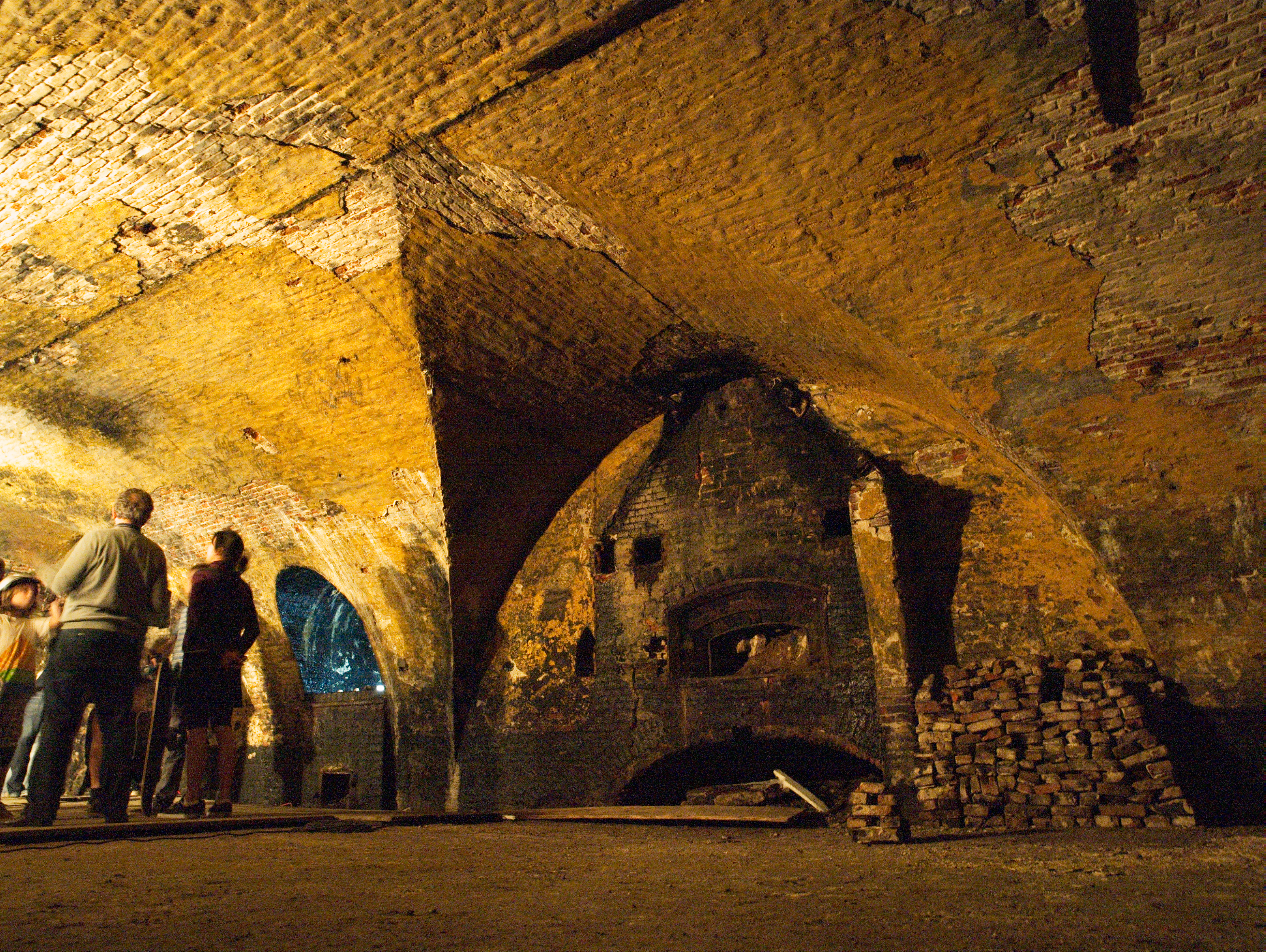 Rijksmonumenten Een gids vertelt zijn verhaal aan bezoekers van de garnizoensbakkerij in het Keizersbolwerk te Vlissingen.